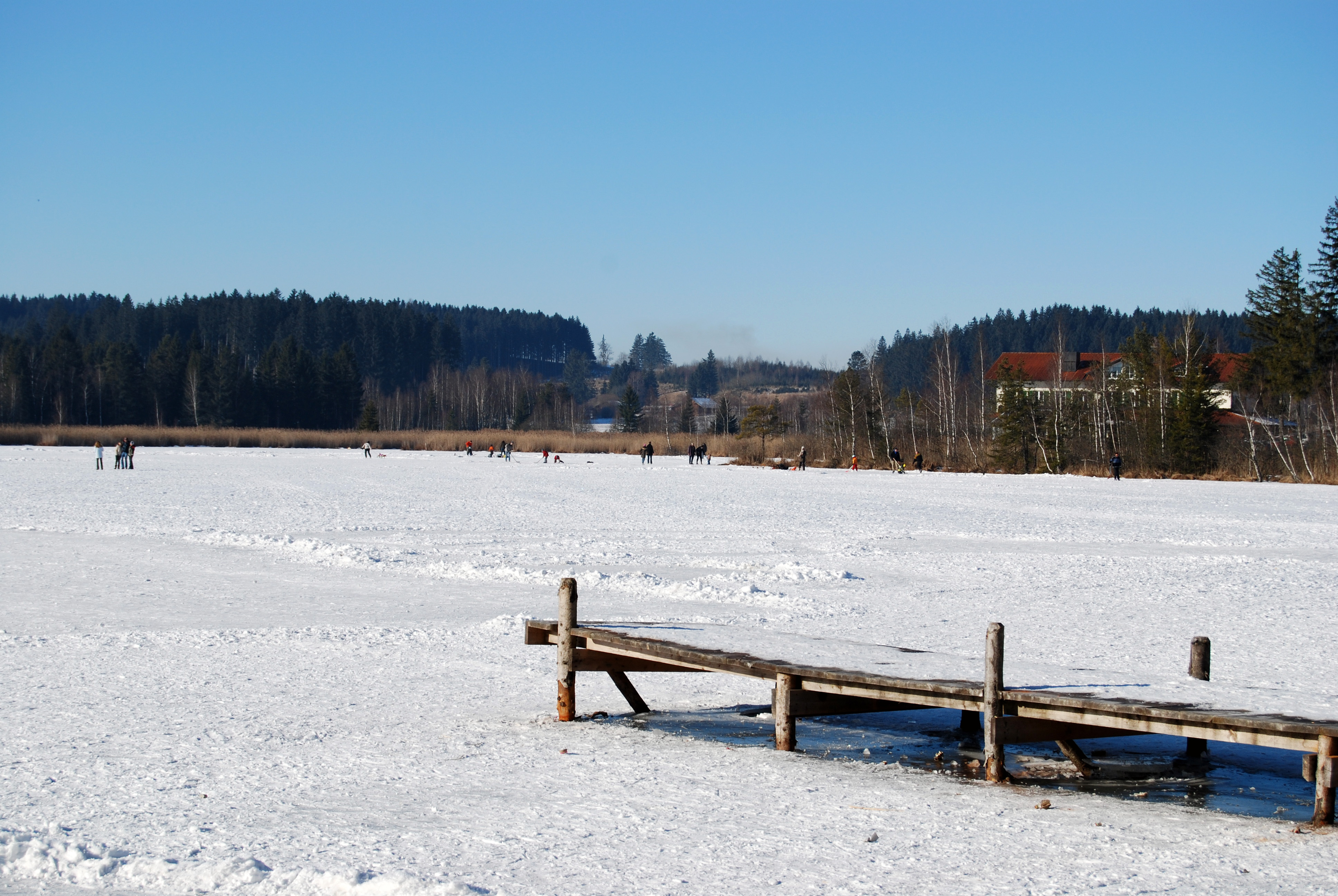 Der Elbsee (LSG) bei Aitrang im Winter.